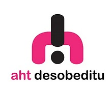 Mugitu!Mugimenduaren logoa.